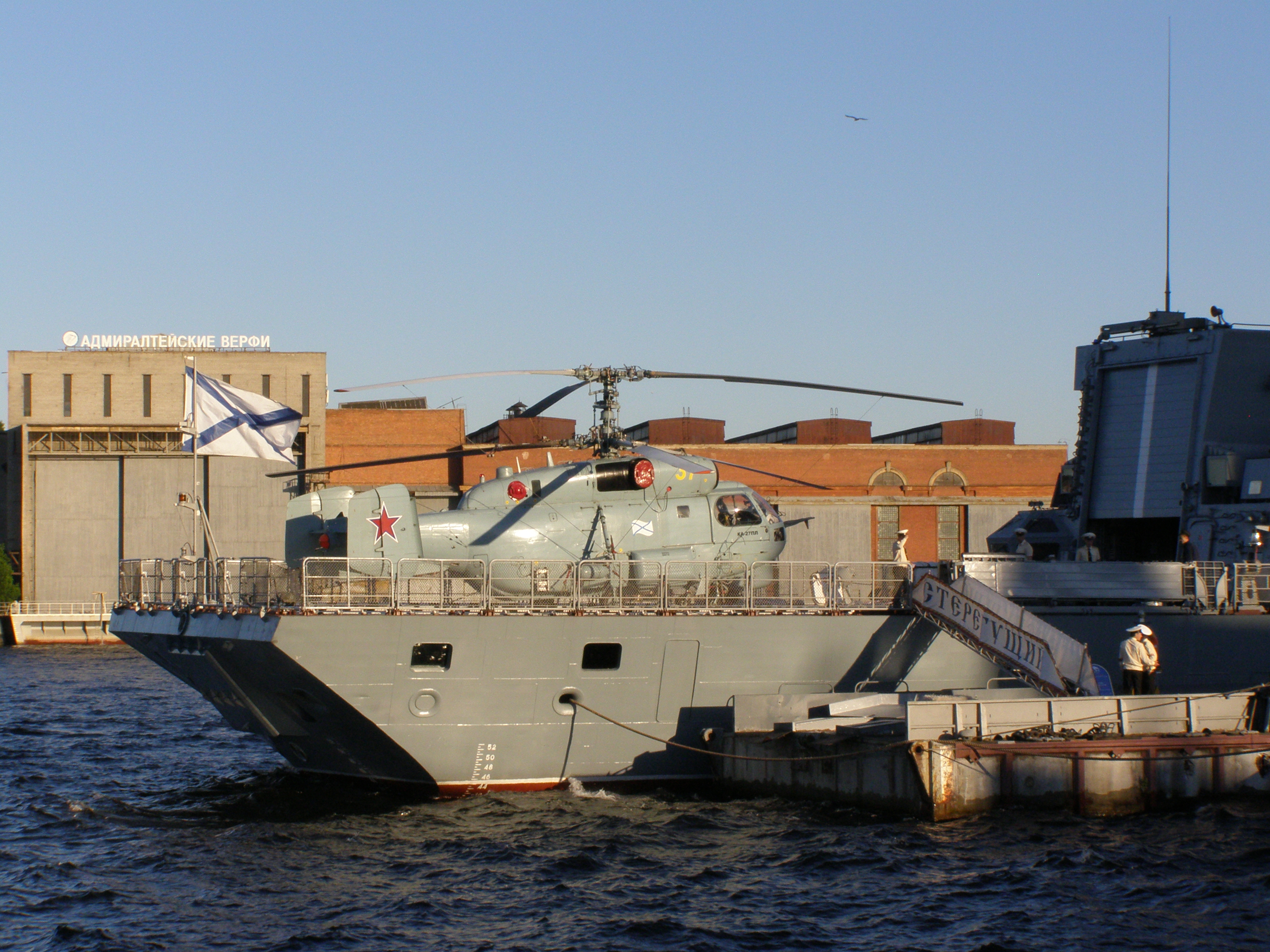 Палубный вертолёт Ка-27пл на Стерегущем.